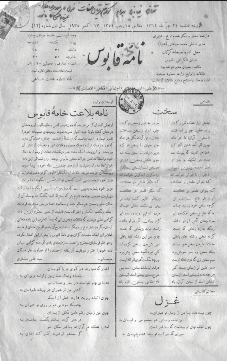 صفحه نخست شماره 12 نامه قابوس. 24 مهر 1314